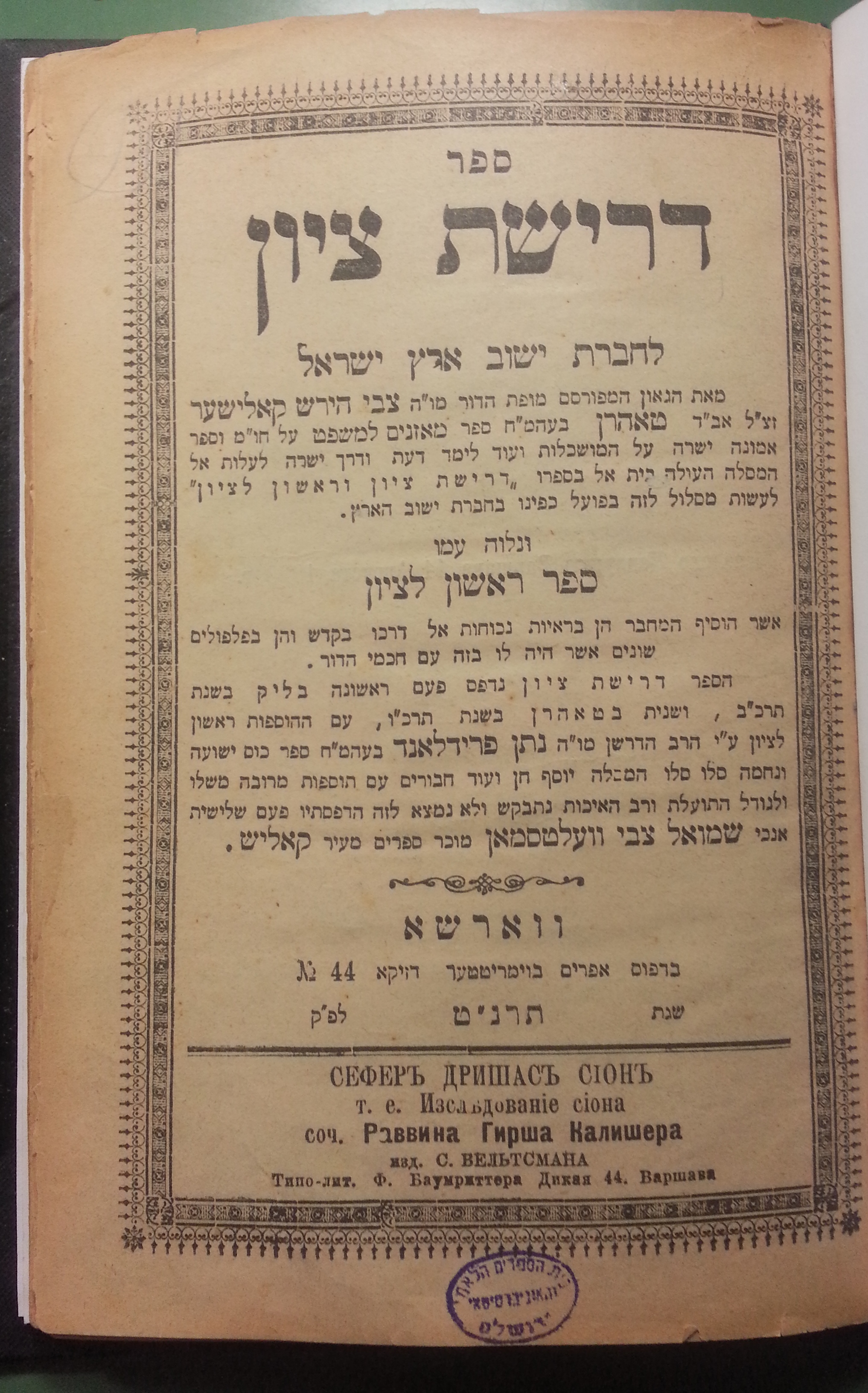 שער ספרו של הרב צבי הירש קלישר: דרישת ציון